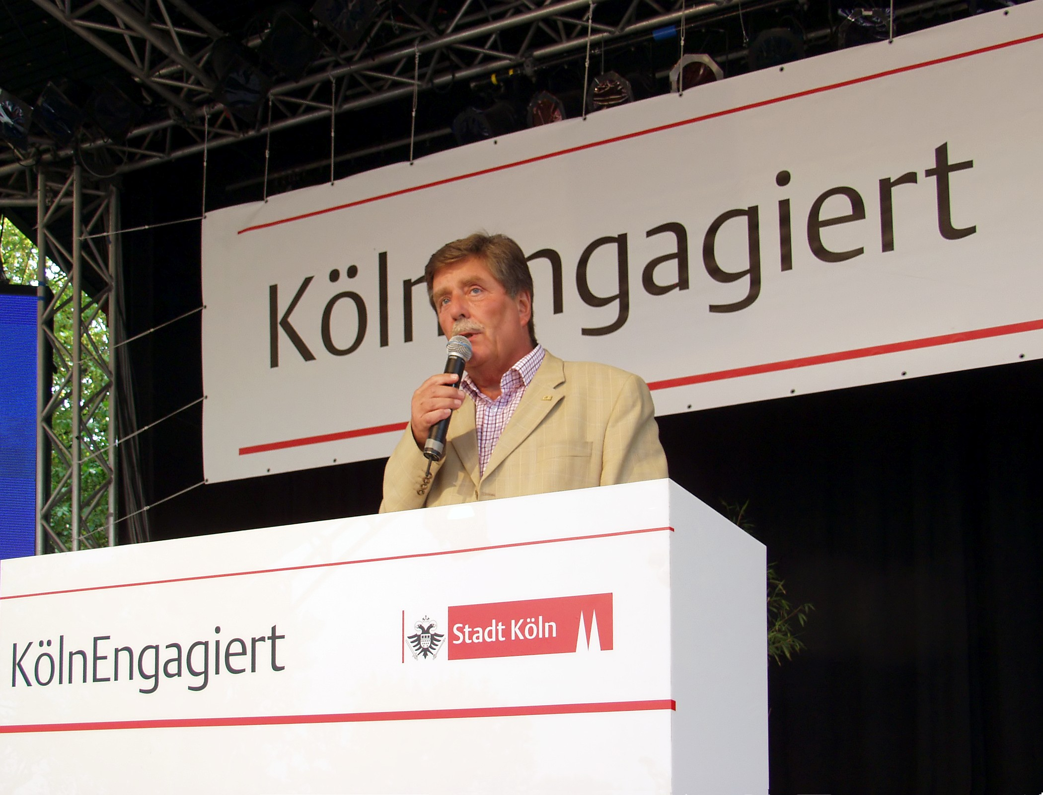 Fritz Schramma, Oberbürgermeister von Köln, hält die Laudatio für einen Preisträger von „KölnEngagiert“ am Kölner Ehrenamtstag. Veranstaltungsort: Tanzbrunnen neben den Rheinhallen, Köln-Deutz.